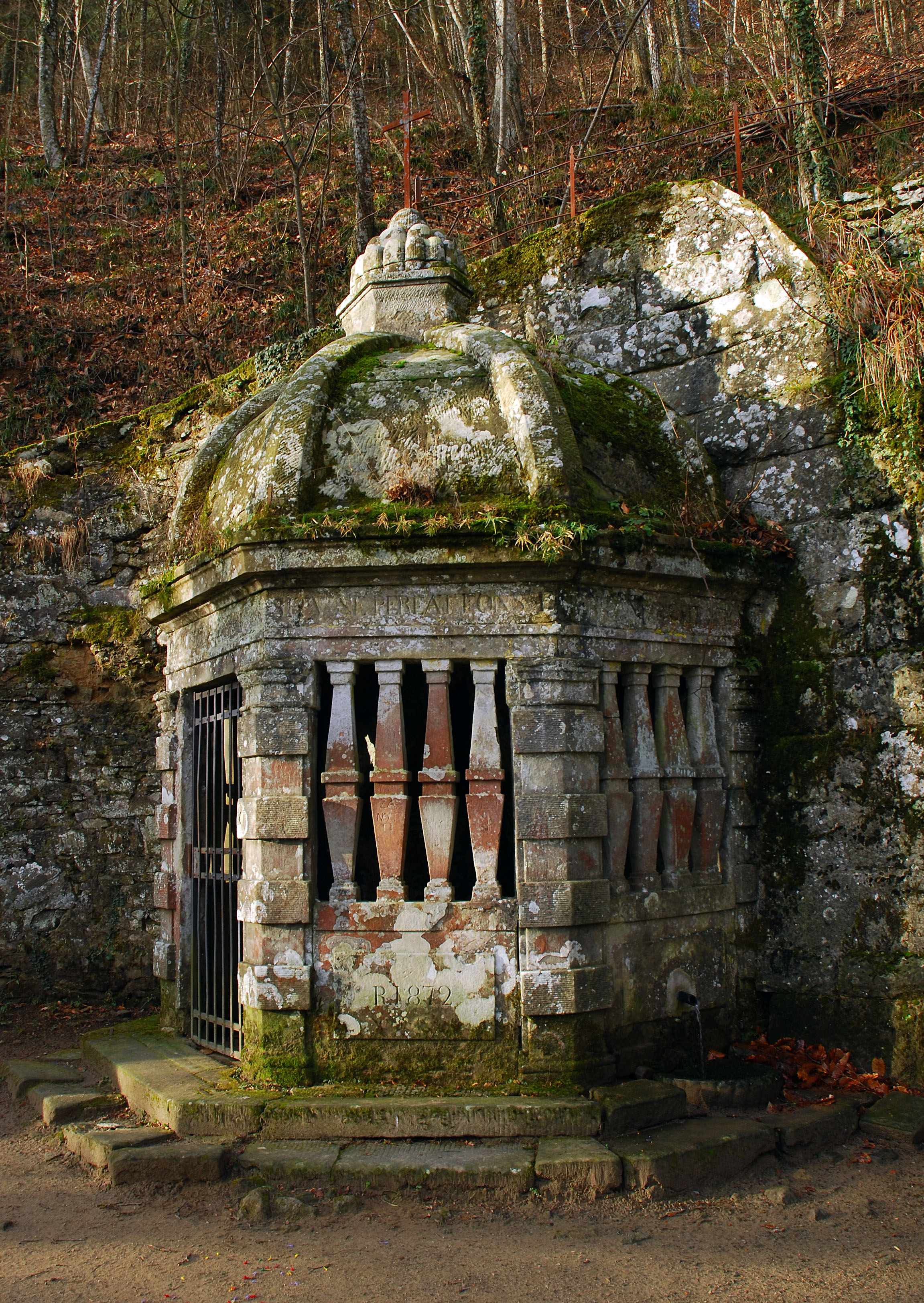 Grotta e fonte di San filippo benizi nel convento di montesenario (Vaglia)